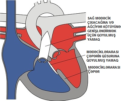 Açıq ürəkdə, süni qan dövranı şəraitində anadangəlmə ürək qüsuru-Fallo tetradasının radikal korreksiyası: mədəciklərararası çəpərin yamaq vasitəsilə tutulması və sağ mədciyin çıxacağı və ağciyər kötüyünə genişləndirmək üçün yamağın qoyulması əməliyyatı.